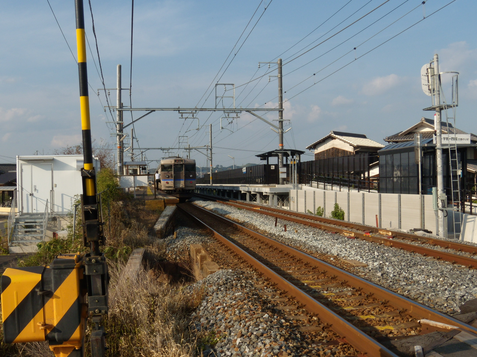 Kuguhara Station